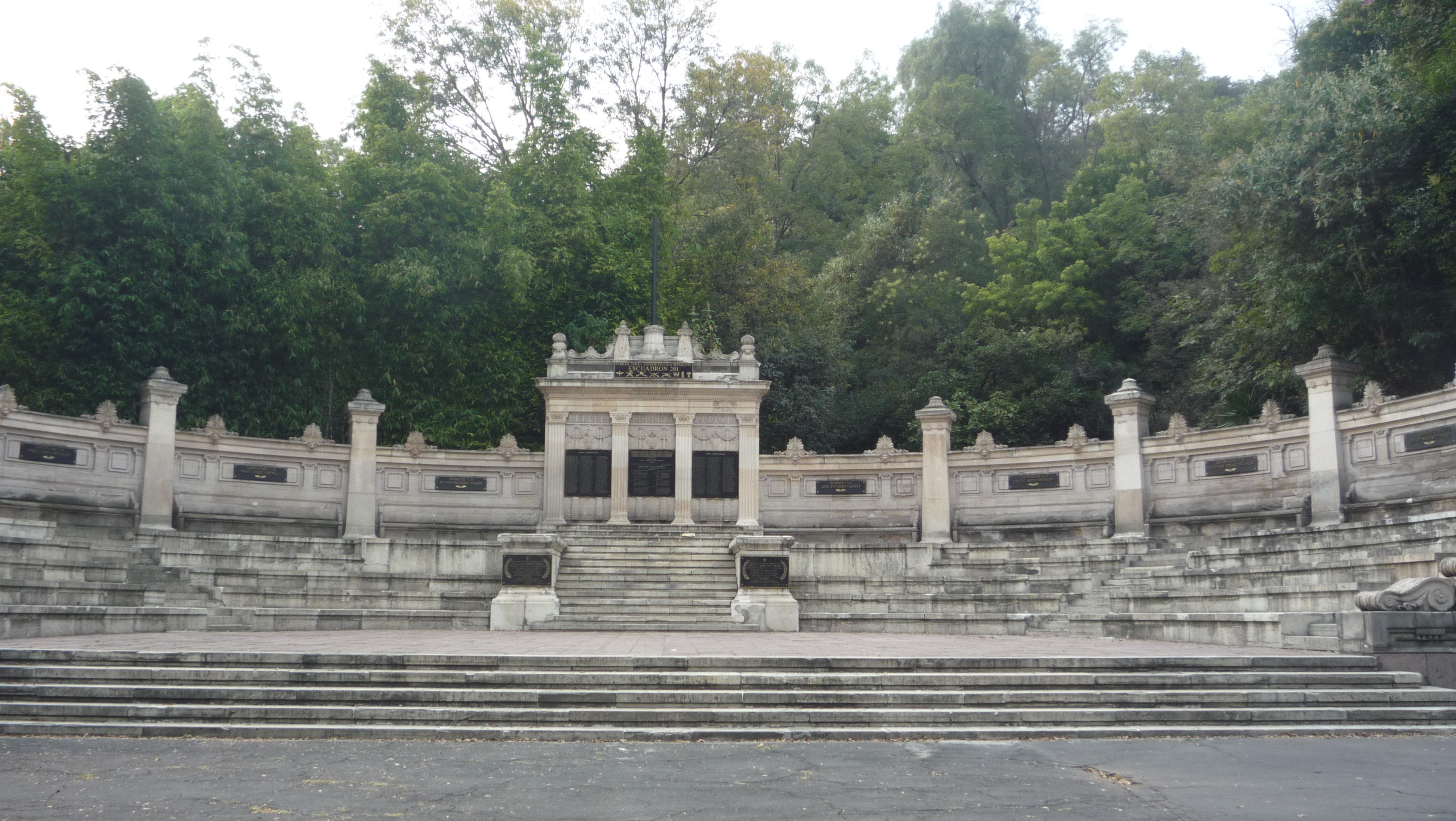 Vista de frente tomada desde el Ahuehuete El General en Chapultepec